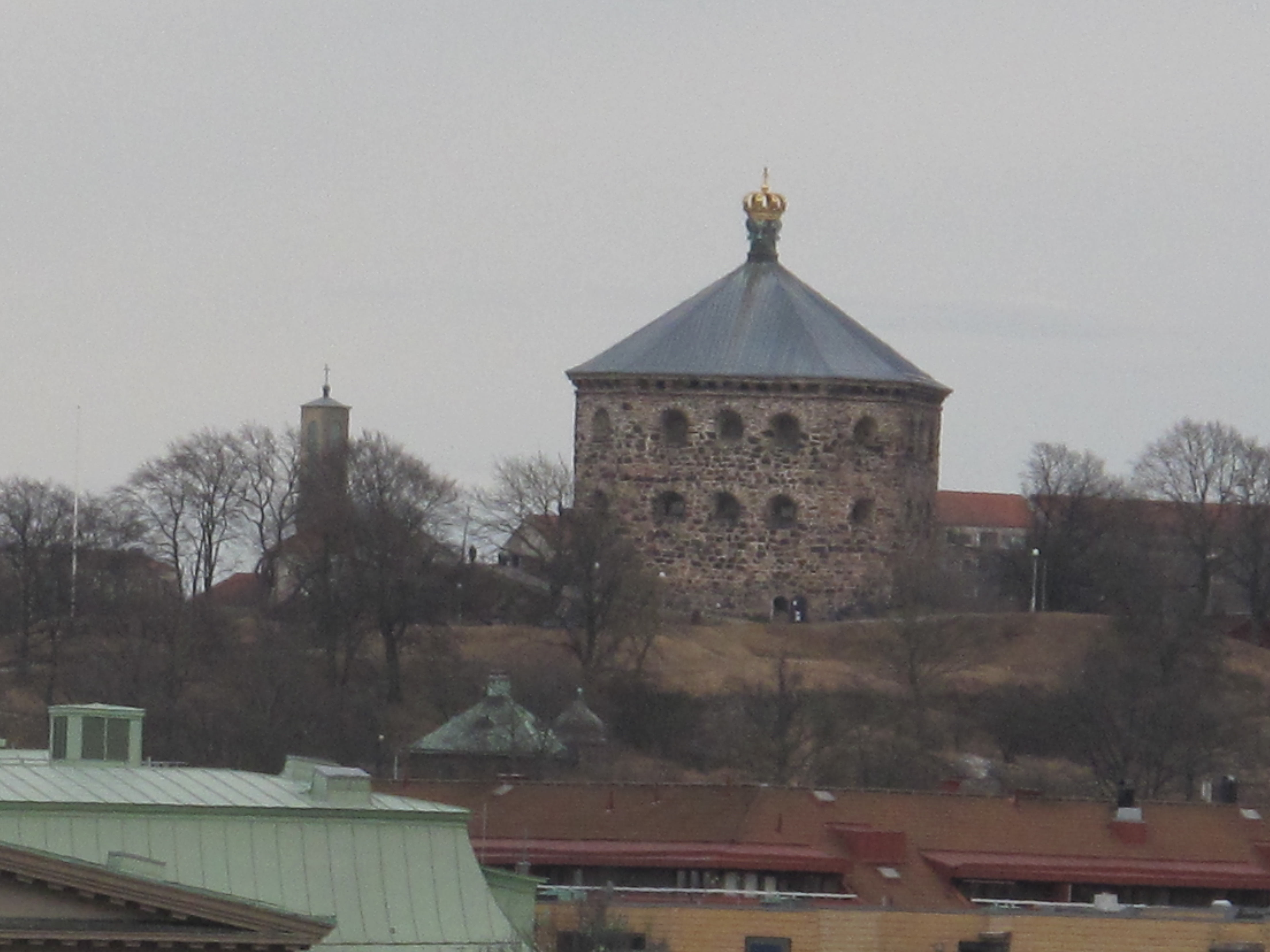 Skansen Lejonet sedd från Stena Danica.